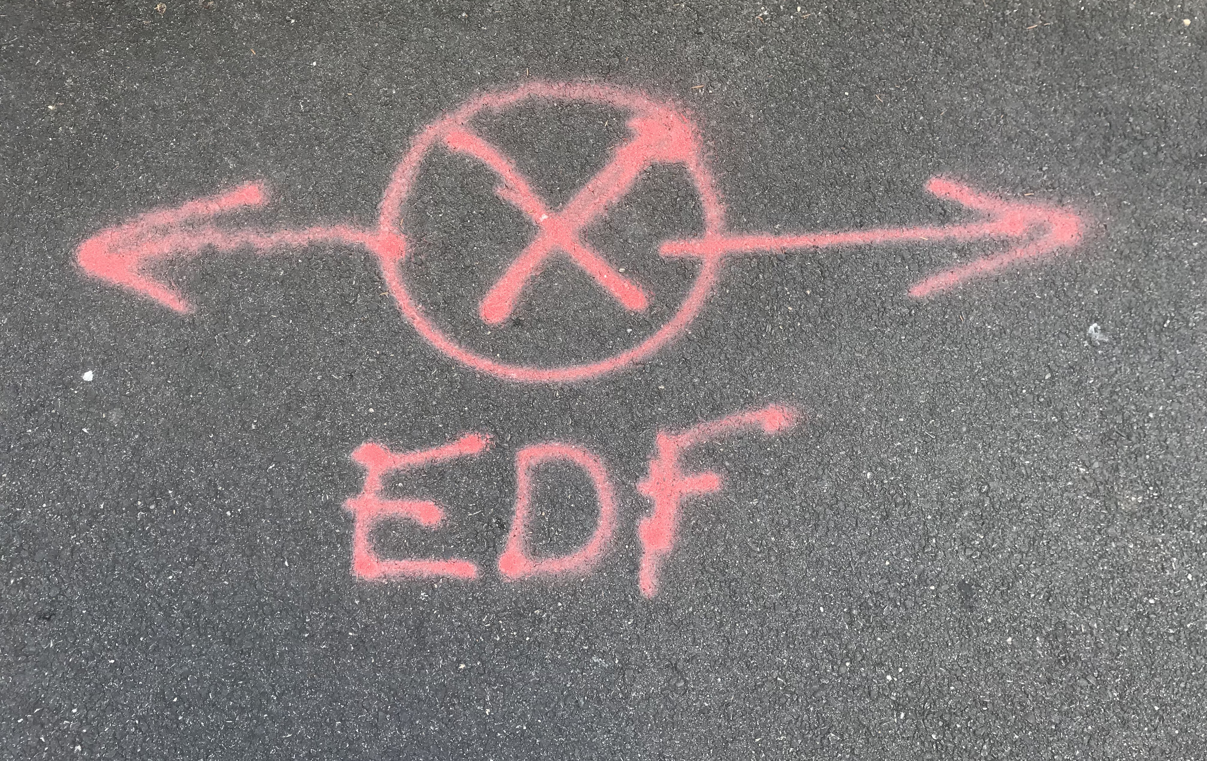 Marquage au sol EDF sur la chaussée - rue des Andrés - Saint-Maurice-de-Beynost.